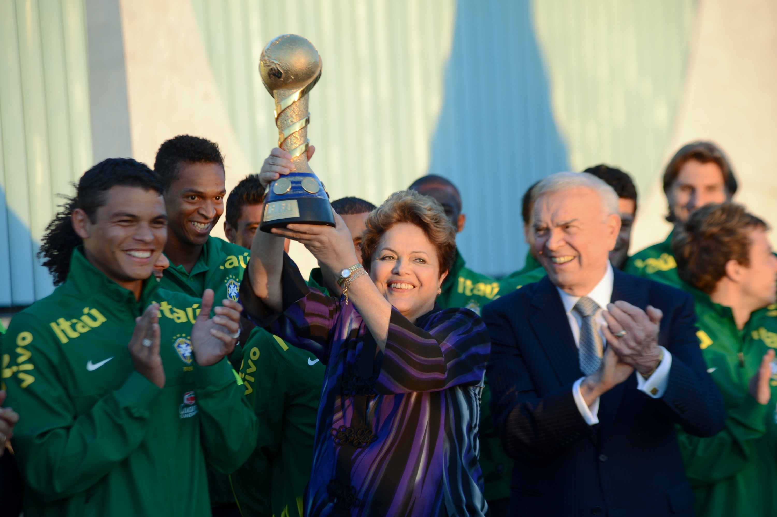 Presidenta Dilma Rousseff recebe Seleção Brasileira de Futebol